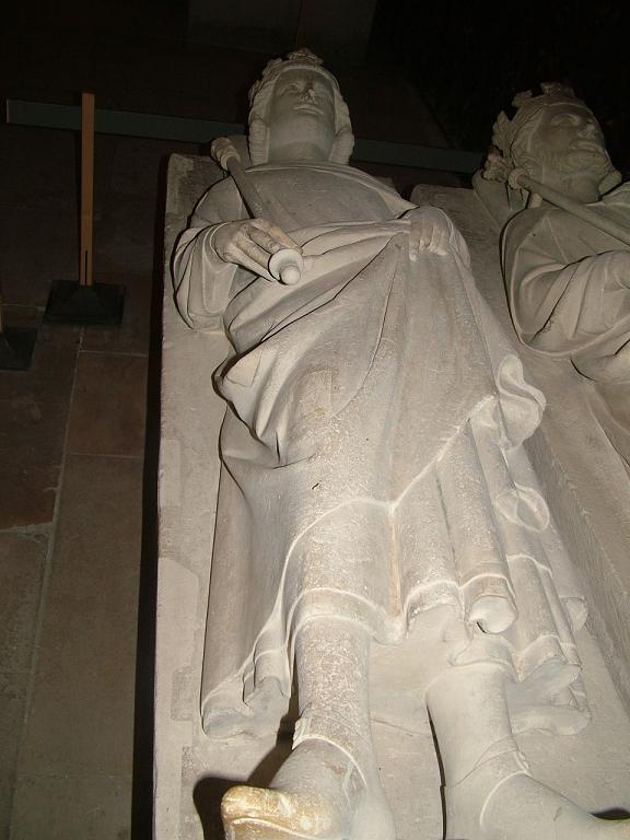 Grab Karlmann II.